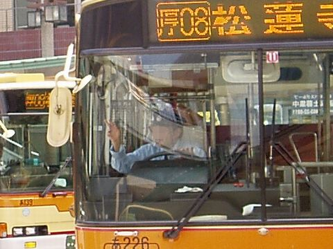 神奈川中央交通 指差呼称